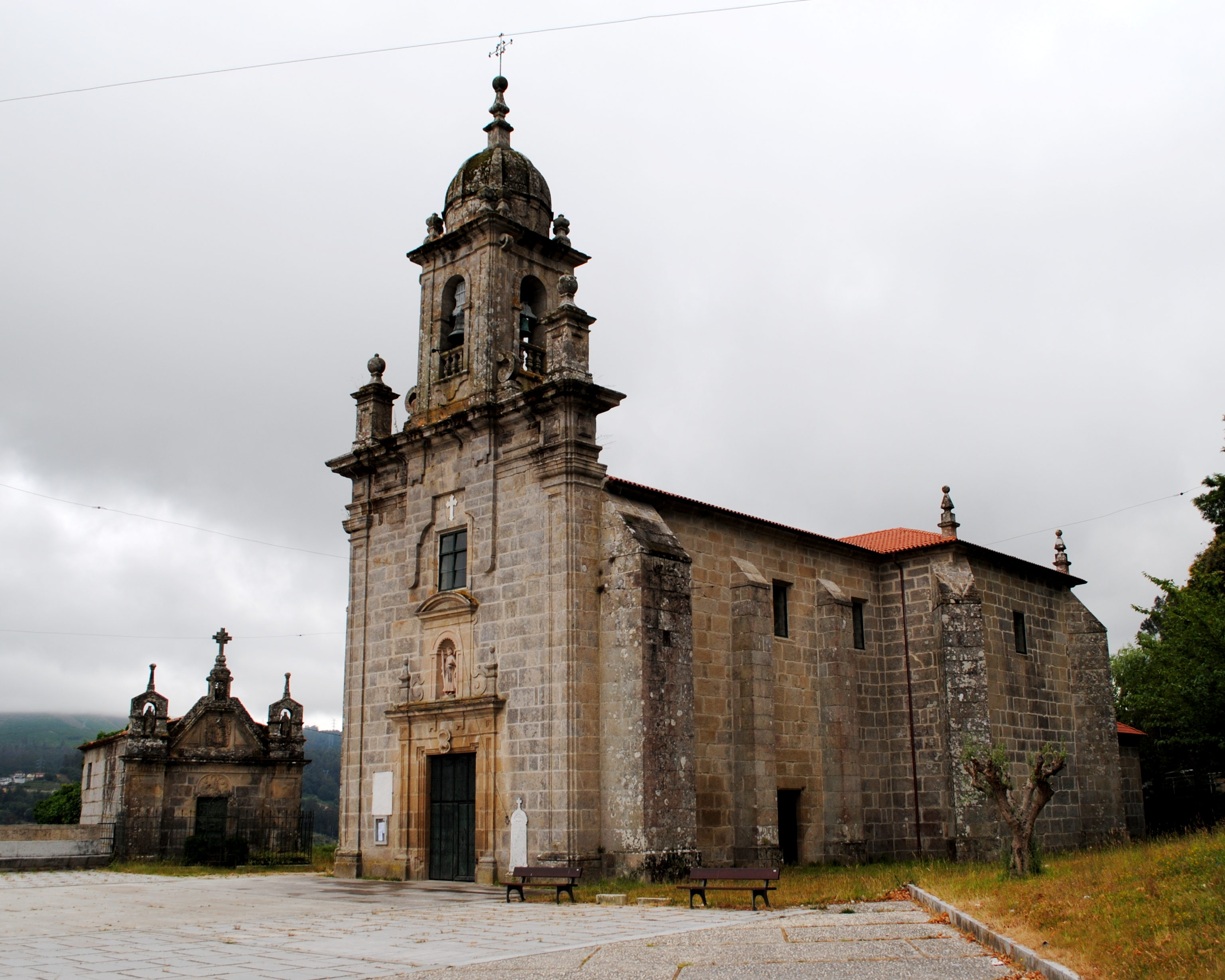 Santo André de Cedeira, Redondela, igrexa construída segundo os planos de Casas Novoa arredor de 1743, un dos mellores exemplos de arquitectura barroca da provincia.Gran Enciclopedia Galega